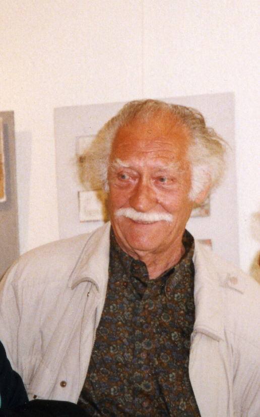 Le peintre français Marcel Bouqueton, vernissage à La Ciotat (France), 1998